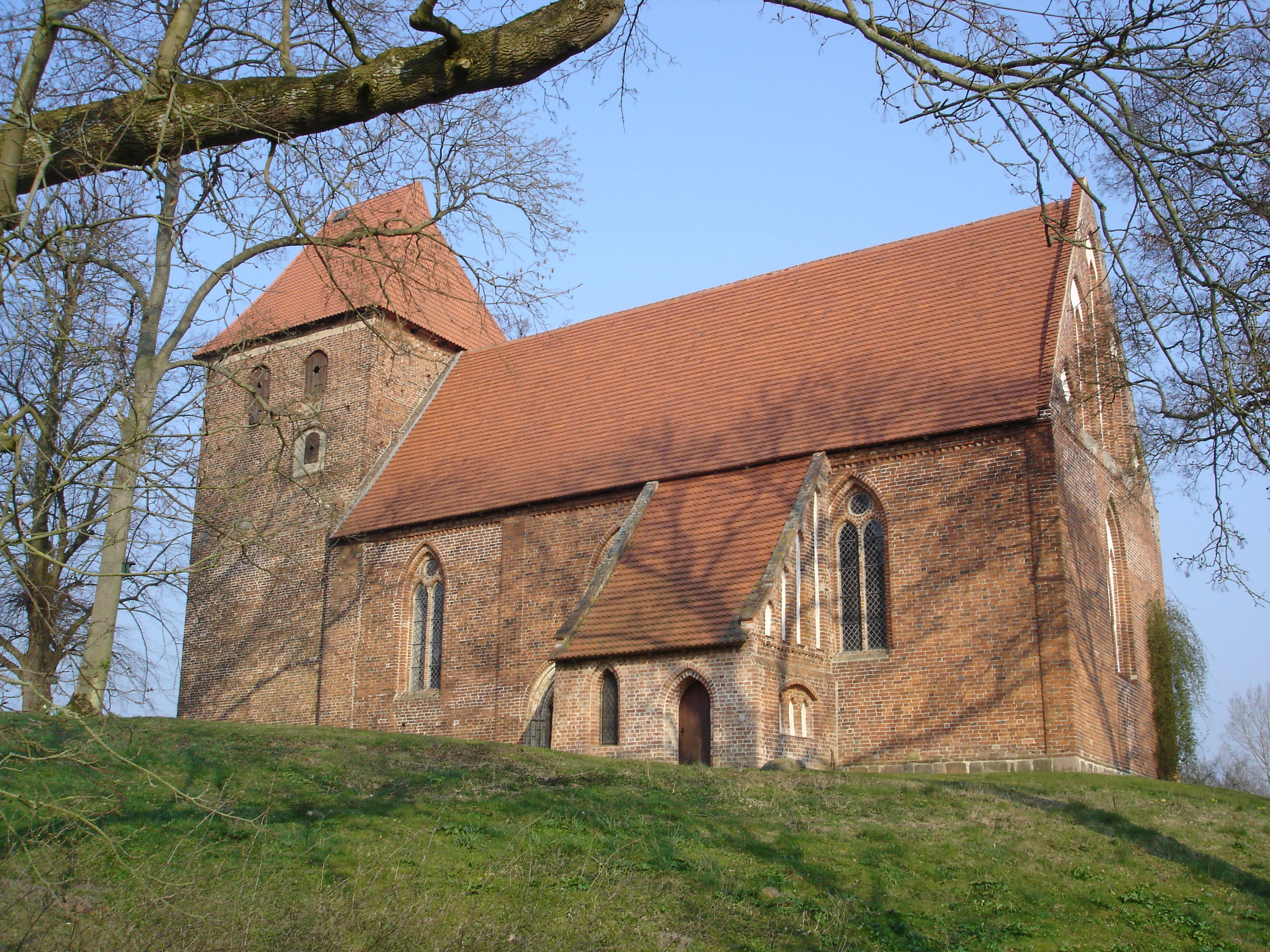 Kirche in Mühlen Eichsen / Church in Mühlen Eichsen (Mecklenburg-Western Pomerania)